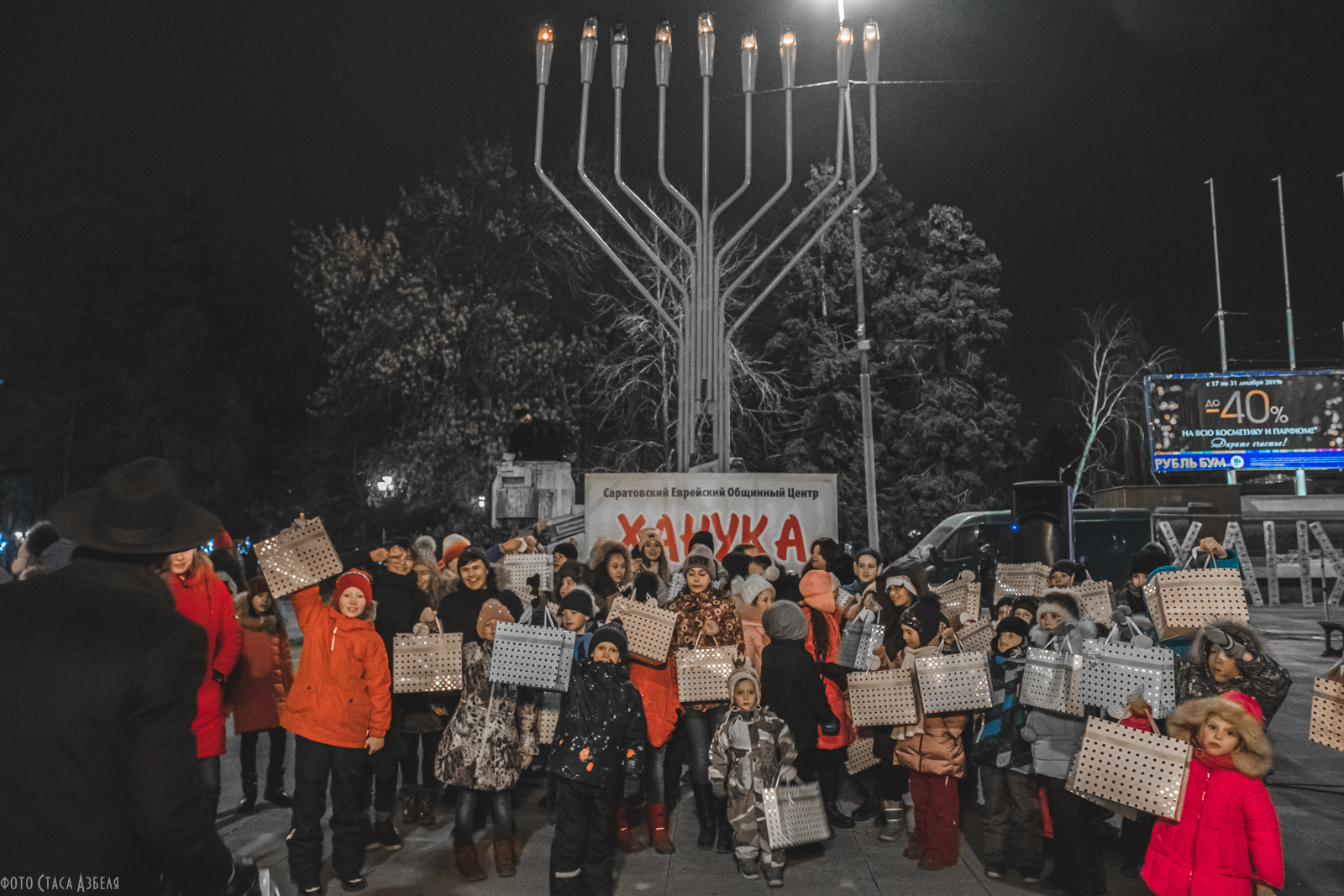 הדלקת החנוכיה המרכזית בעיר סרטוב, במסגרת הפעילות של שליח חב"ד בעיר. חנוכה ה'תש"פ 2020